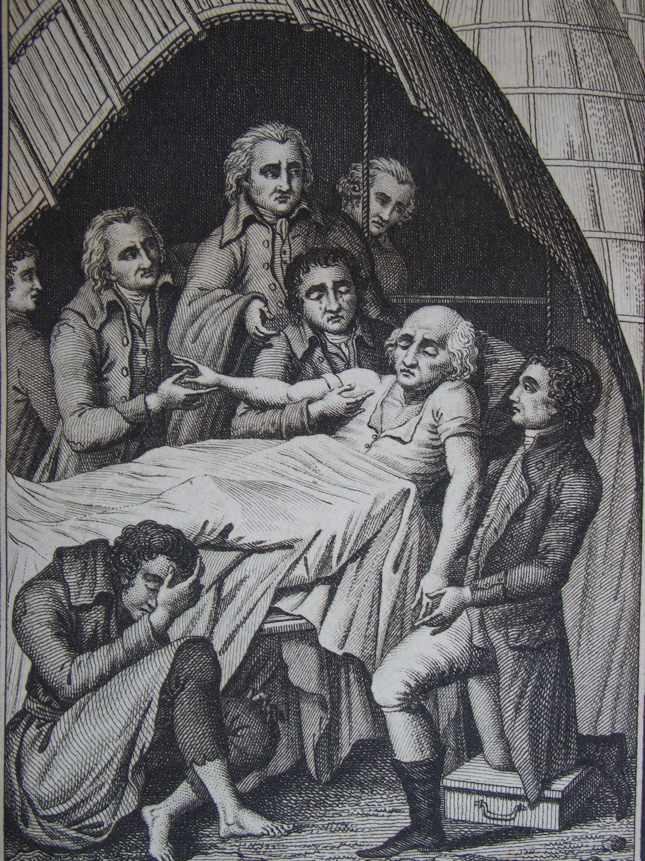 Gravure représentant la maladie d'un déporté de fructidor à Sinnamary